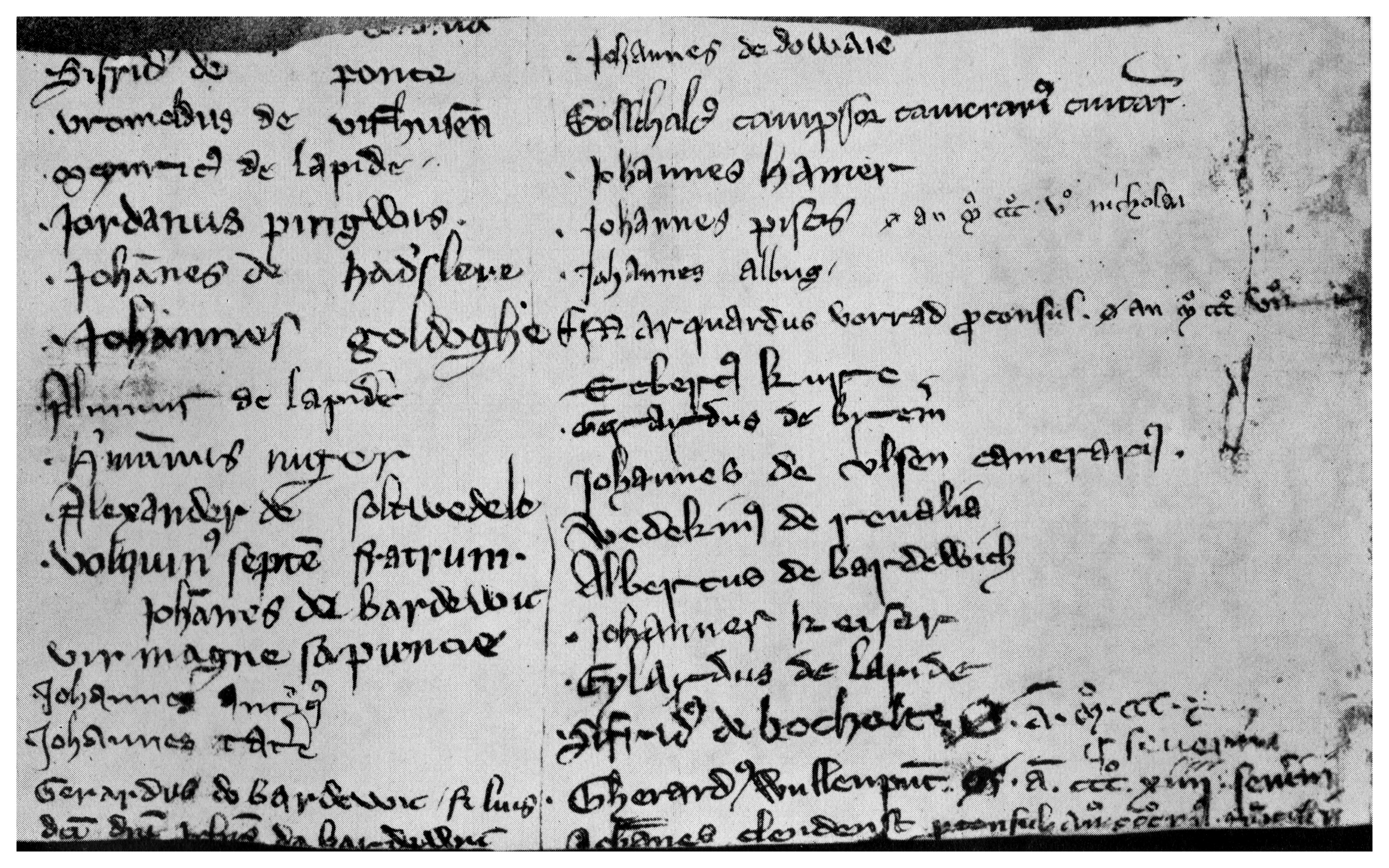 Fragment der ältesten Lübecker Ratslinie (Vorderseite). Von dem Bibliothekar Ernst Deecke vor 1842 für die Stadtbibliothek Lübeck von einem Trödler erworben (Ernst Deecke: "Von der ältesten Lübeckischen Rathslinie - eine Jubelschrift im Namen des Catharineums zu Lübeck, von Rodhen' sche Buchhandlung, Lübeck 1842") und 1927 an das Archiv der Hansestadt Lübeck vertauscht.